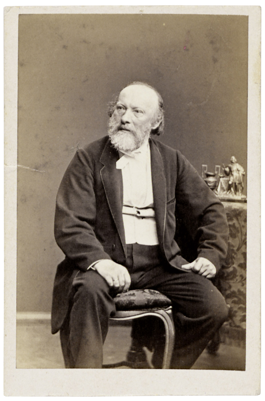 Friedrich Drake, sculptor. Circa 8,5 x 5,5 cm.